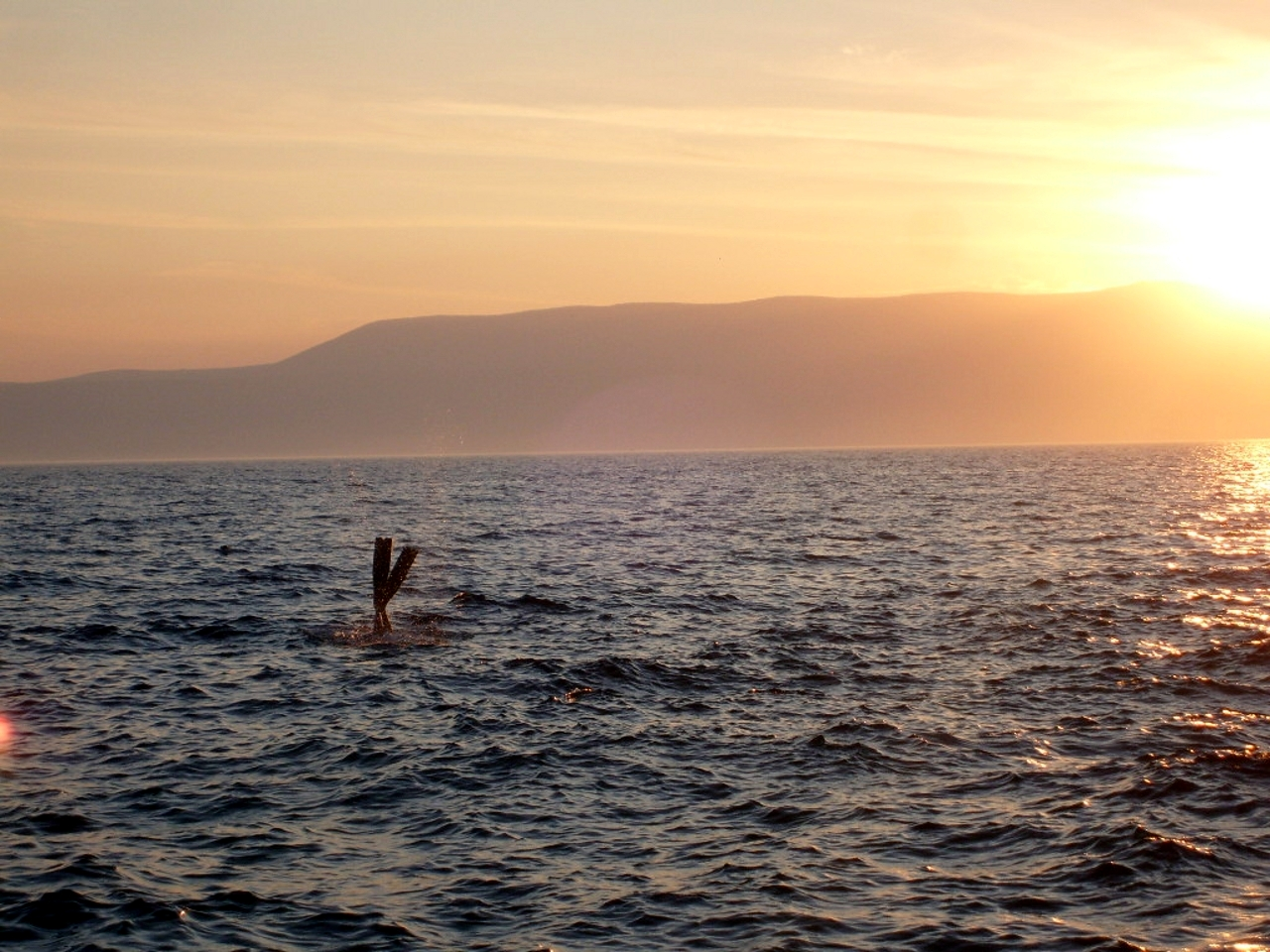 Impression Soleil Plongeant